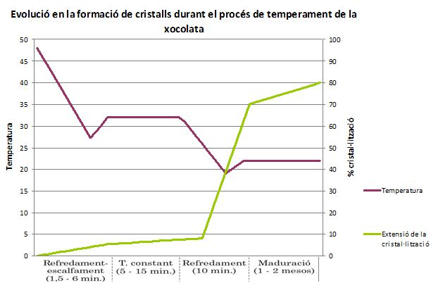 Evolució en la formació de cristalls durant el procés de temperament de la xocolata controlant la temperatura.